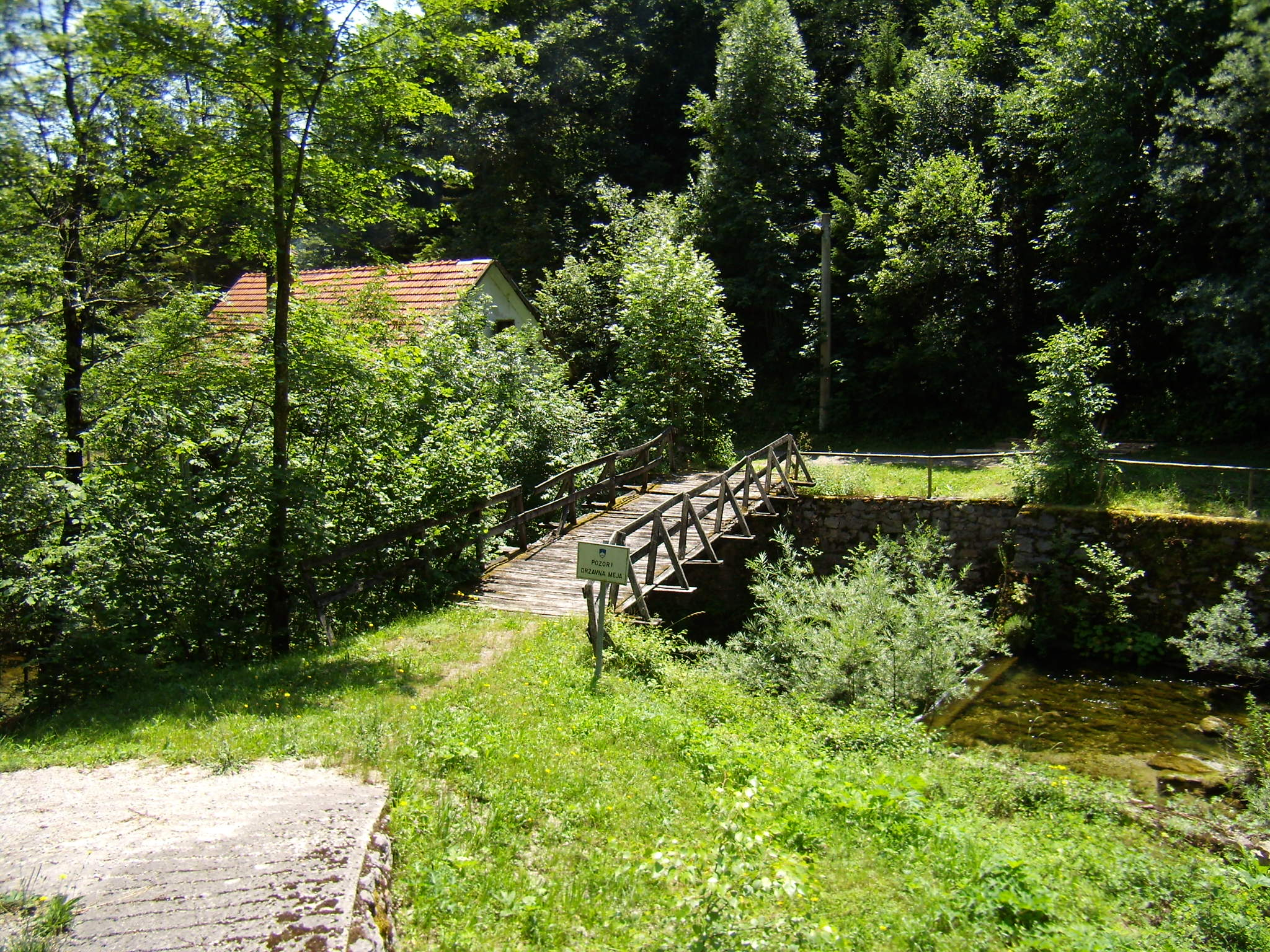 Mejna reka Čabranka pri Podplanini.